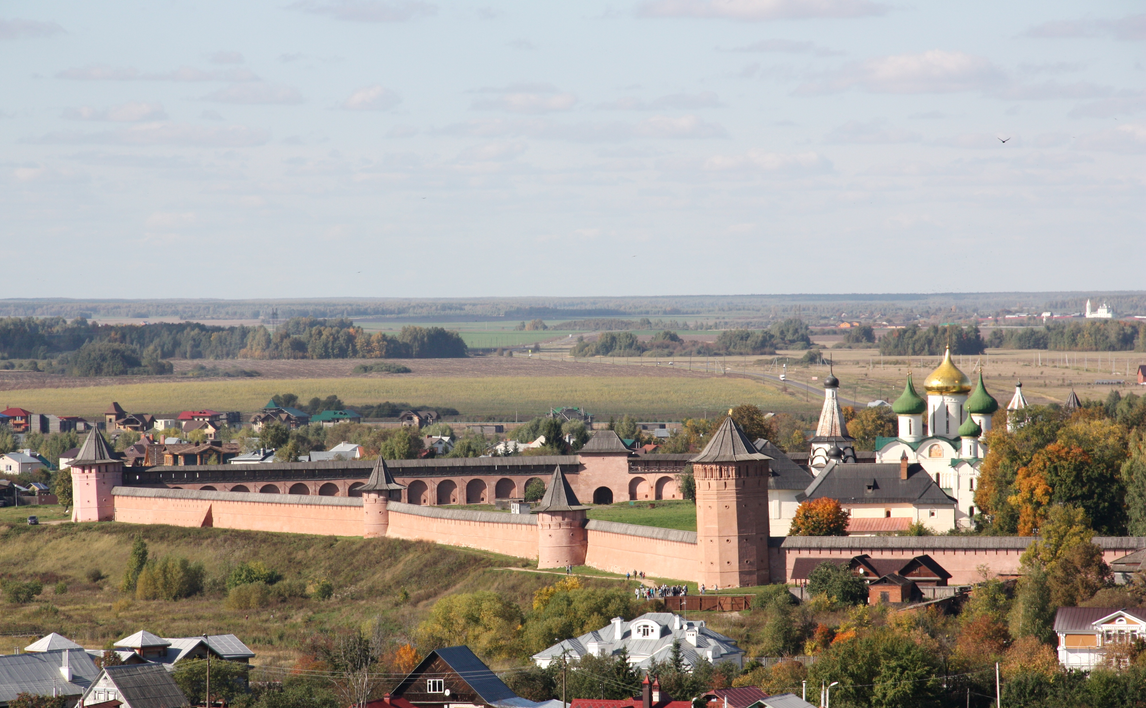 Ансамбль Спасо-Евфимиева монастыря: Ленина улица, 135, Суздаль, Суздальский район, Владимирская область